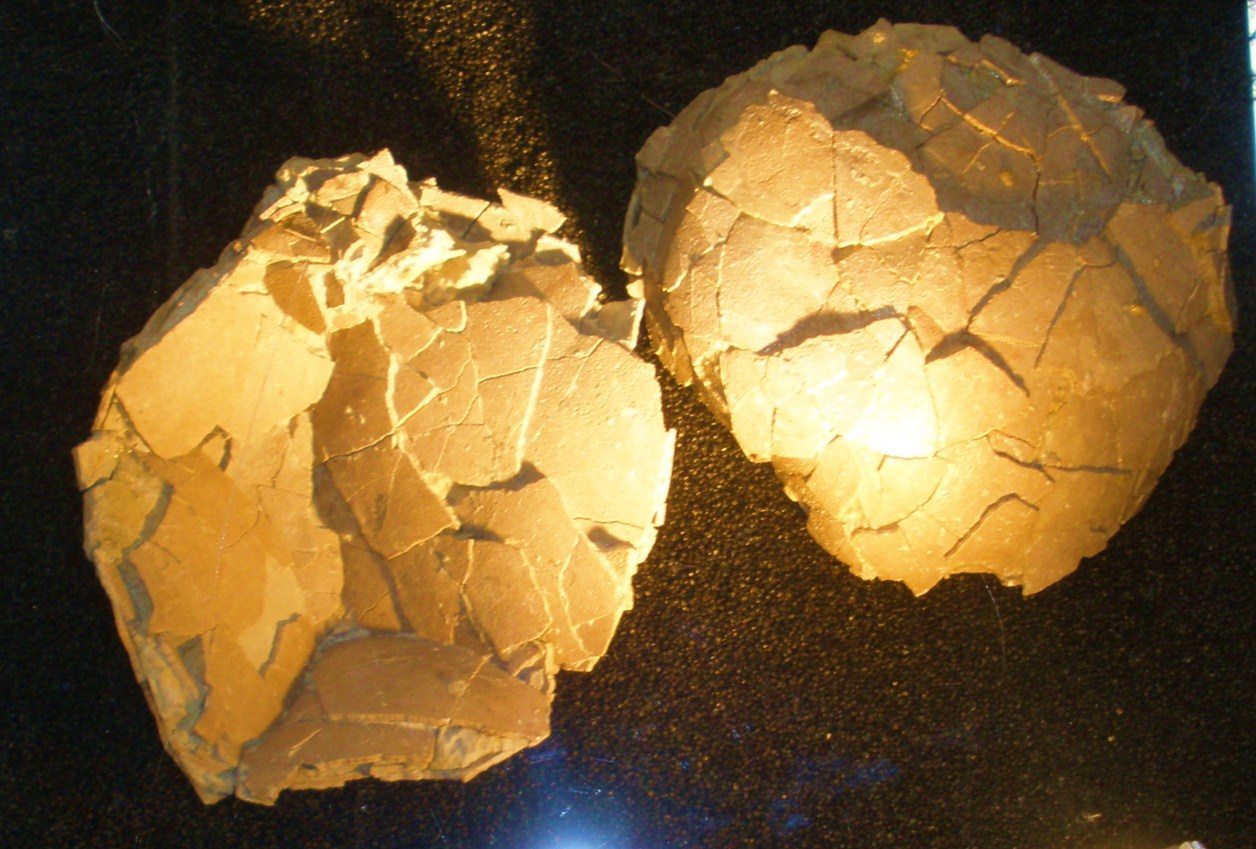 Cairanoolithus, a fossil dinosaur egg. Took the photo at Fossil Show, Munich